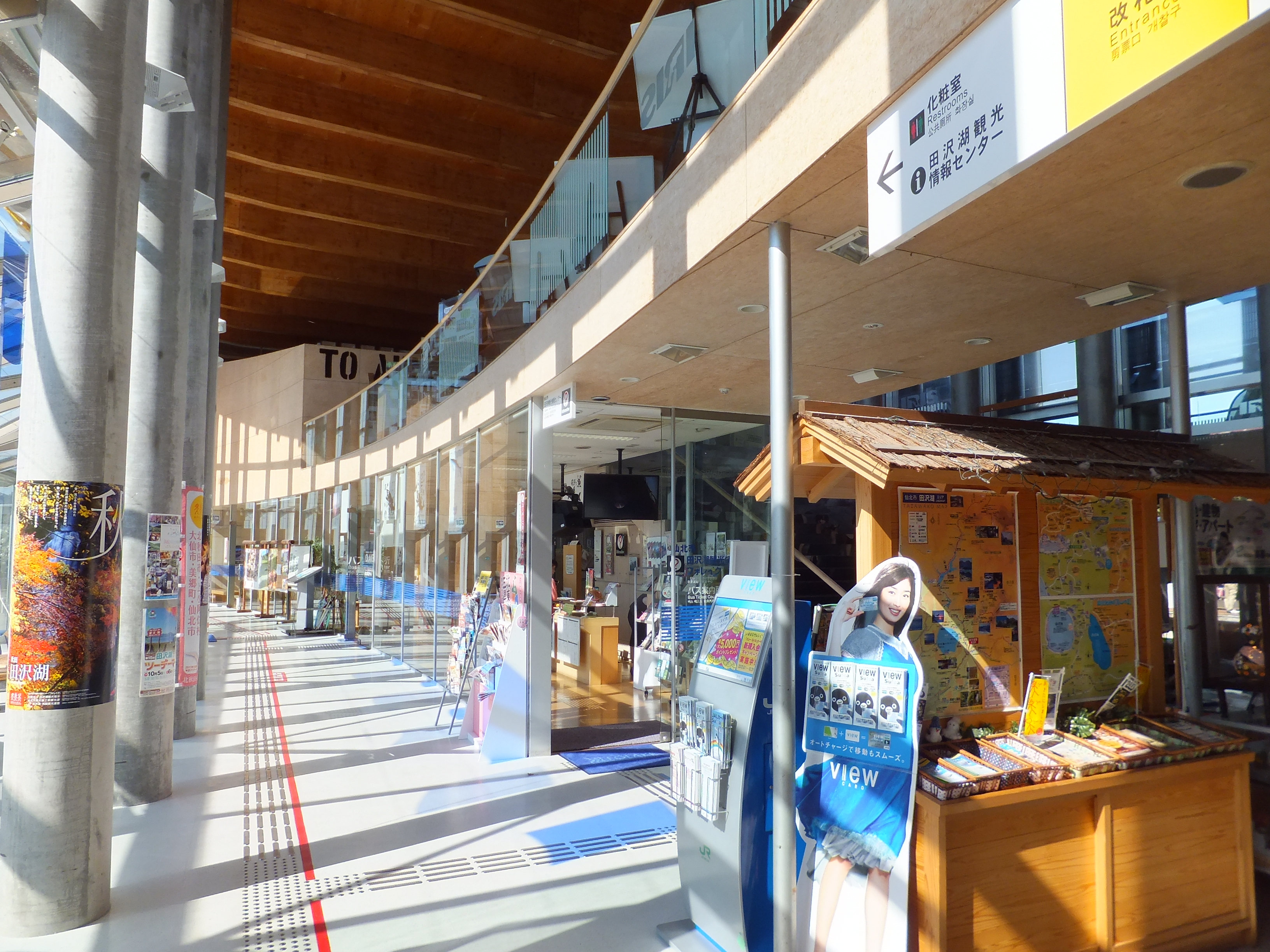 秋田新幹線・田沢湖線田沢湖駅駅舎内部